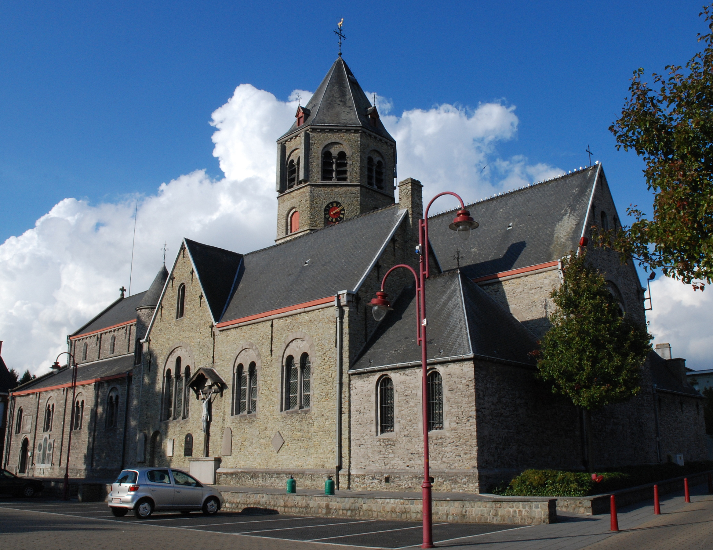 De Heilig-Kruiskerk te Lotenhulle, België